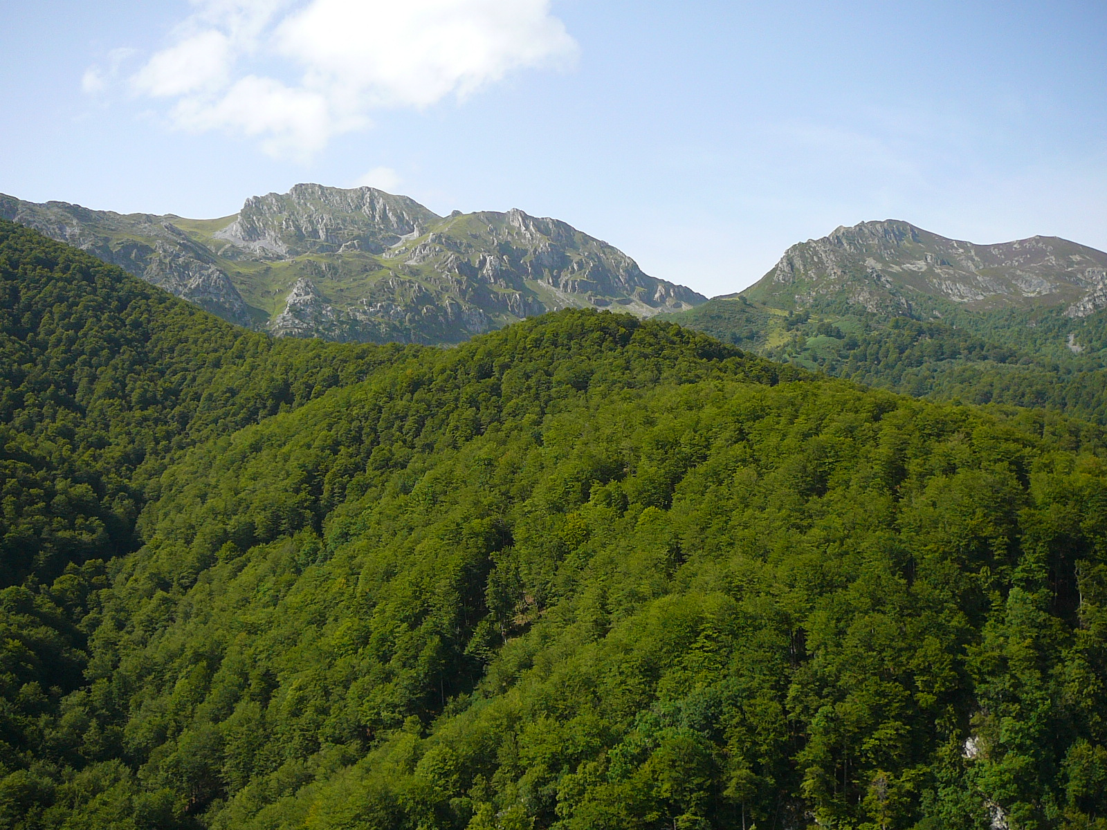 Hayedos en el Parque de Redes